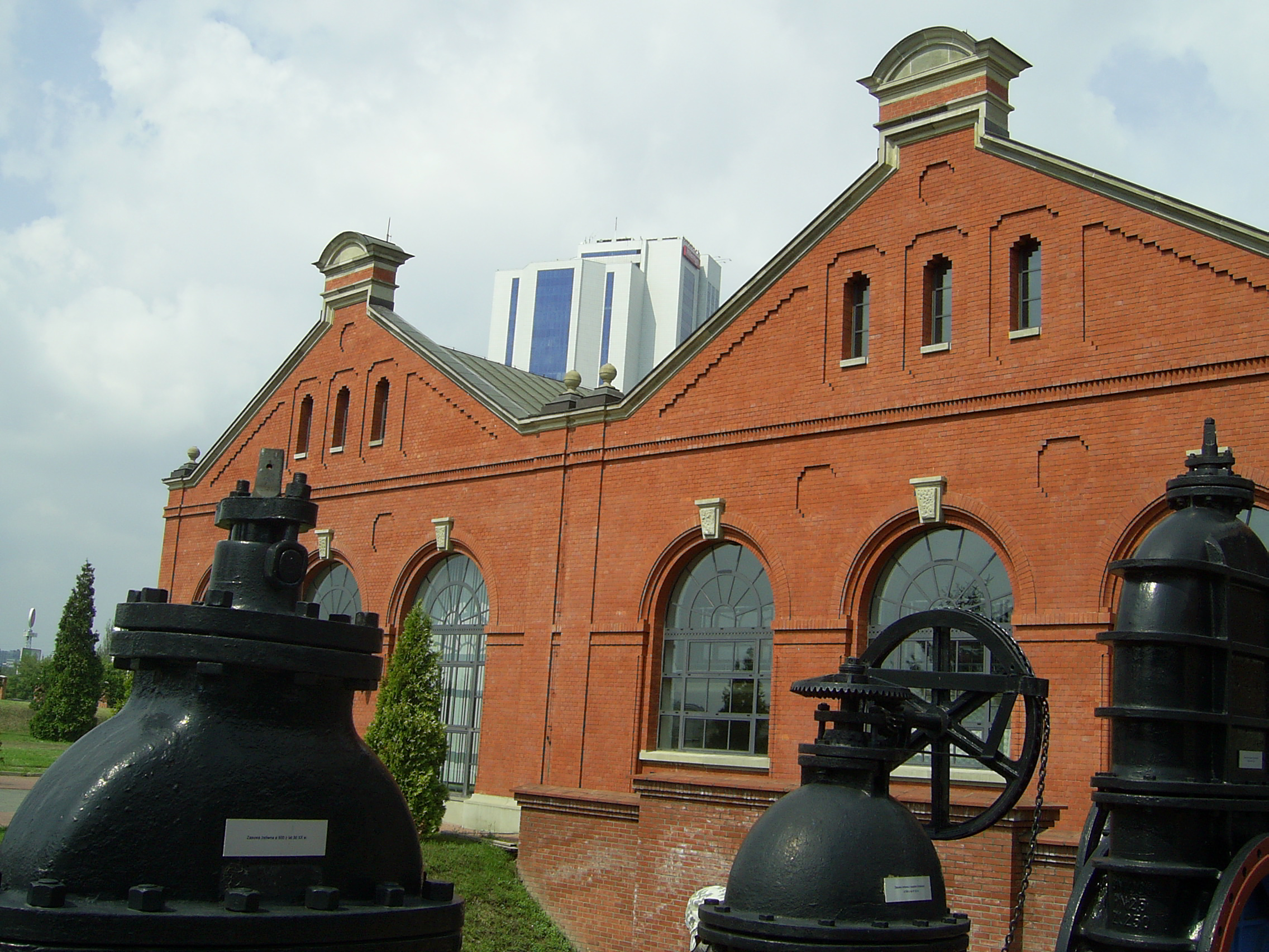 Filtry Lindleya